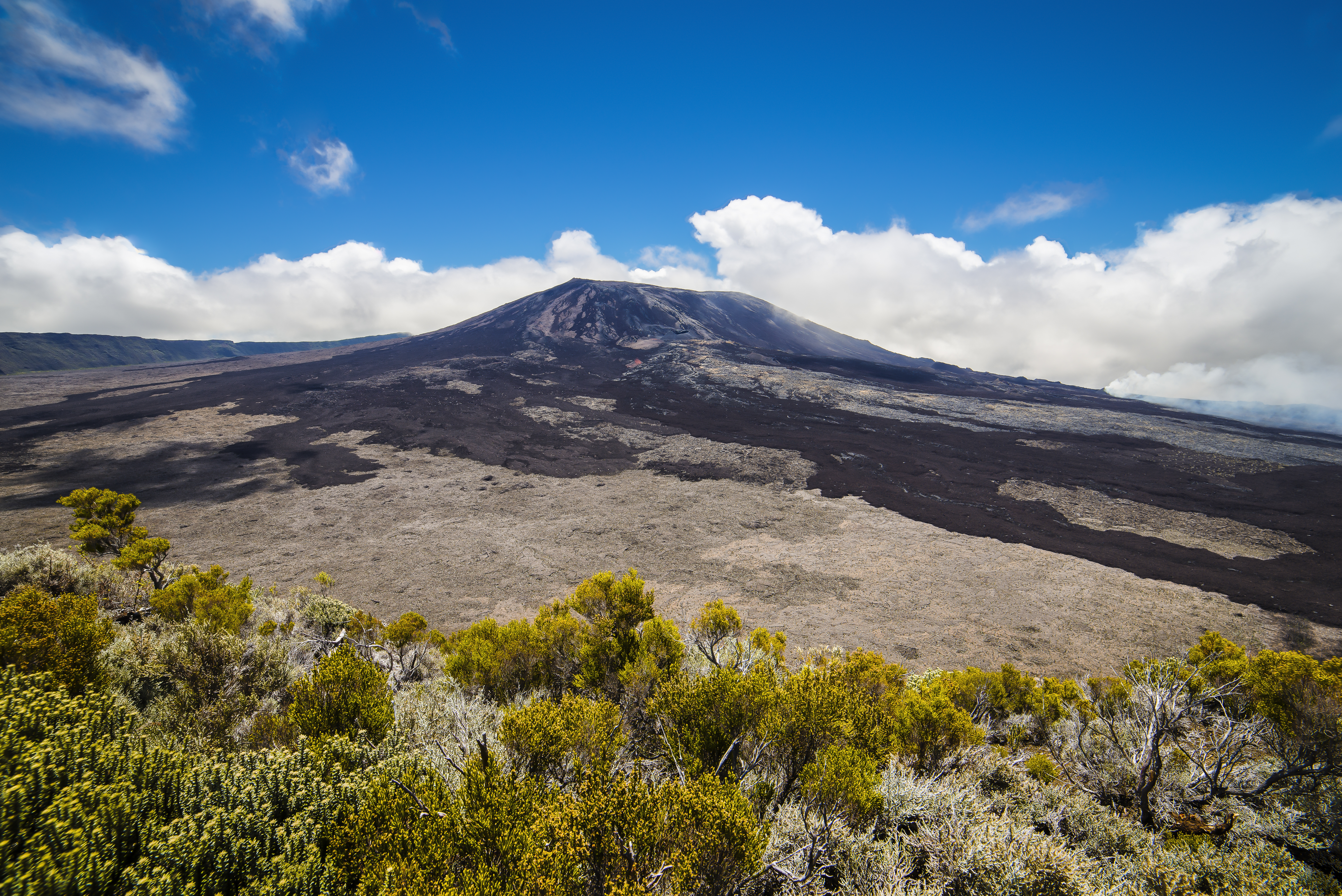 Site du piton de la fournaise à l'île de La Réunion.